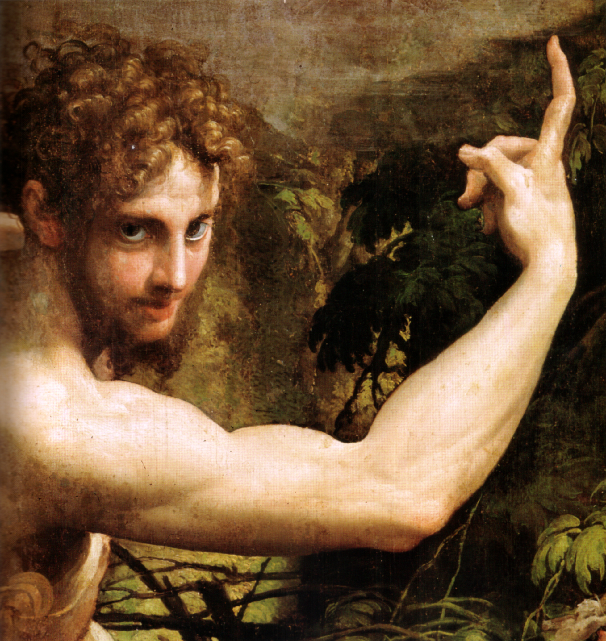 detail